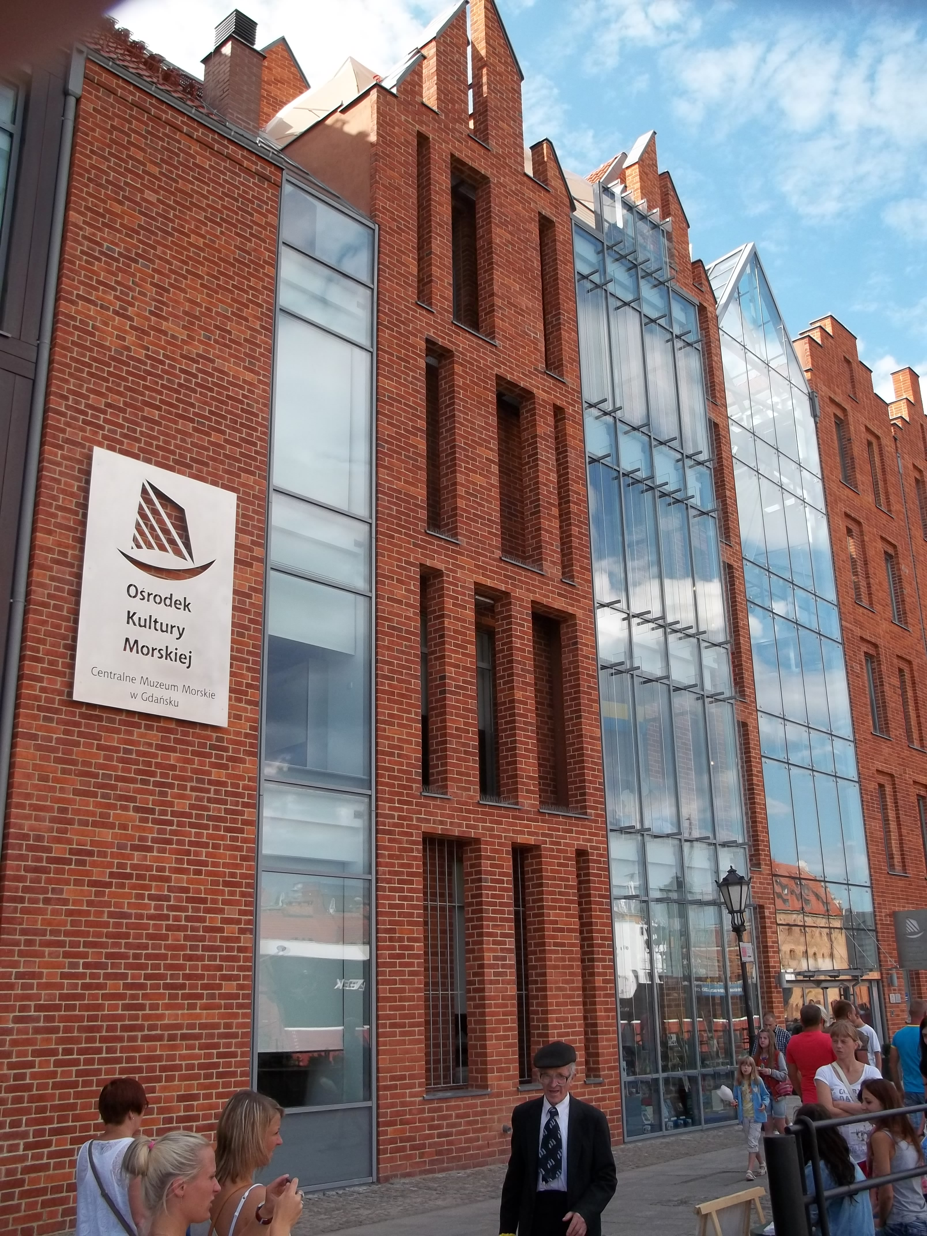 Ośrodek Kultury Morskiej - Gdańsk